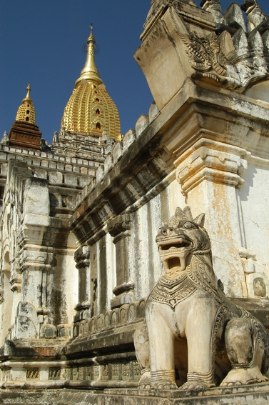 Der reich verzierte Ananda-Tempel in Bagan